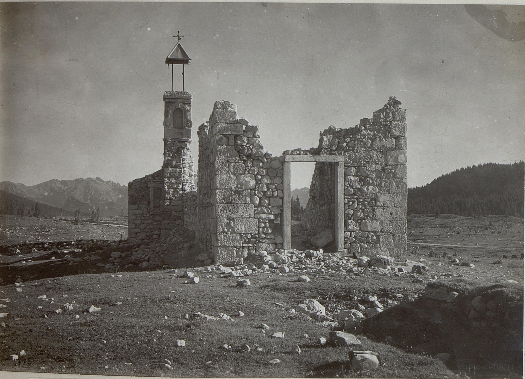 Mga.di Marcesina.Zerschossene Kirche.